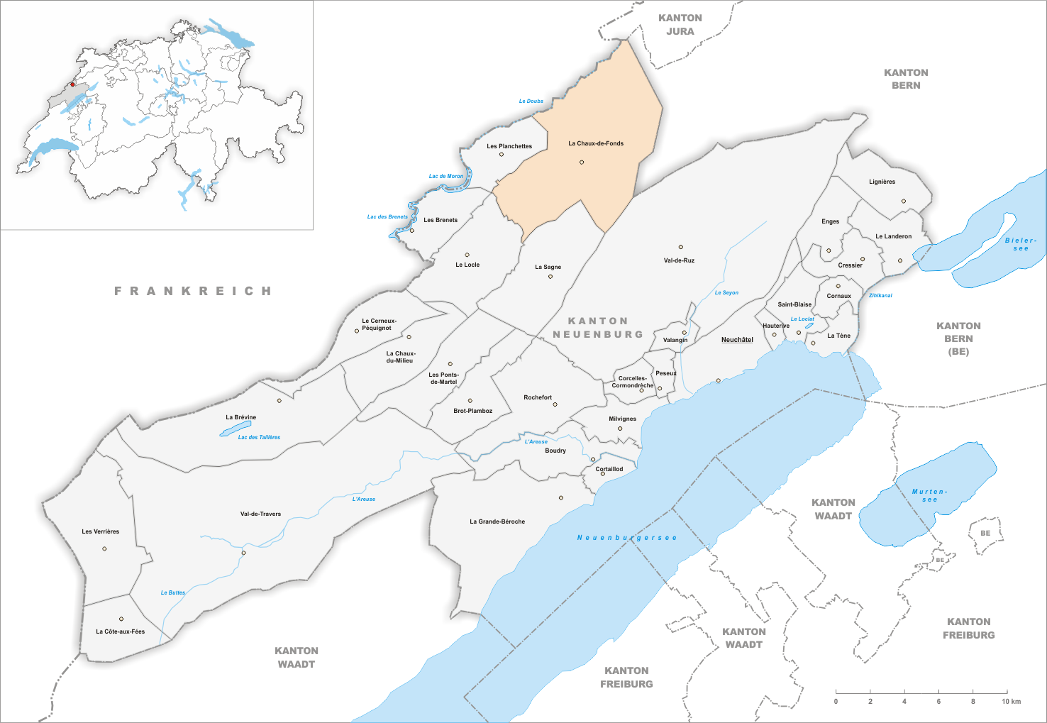 Municipality La Chaux-de-Fonds